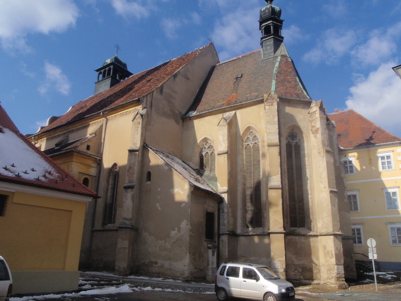 Sankt Jakobus Kirche Güns